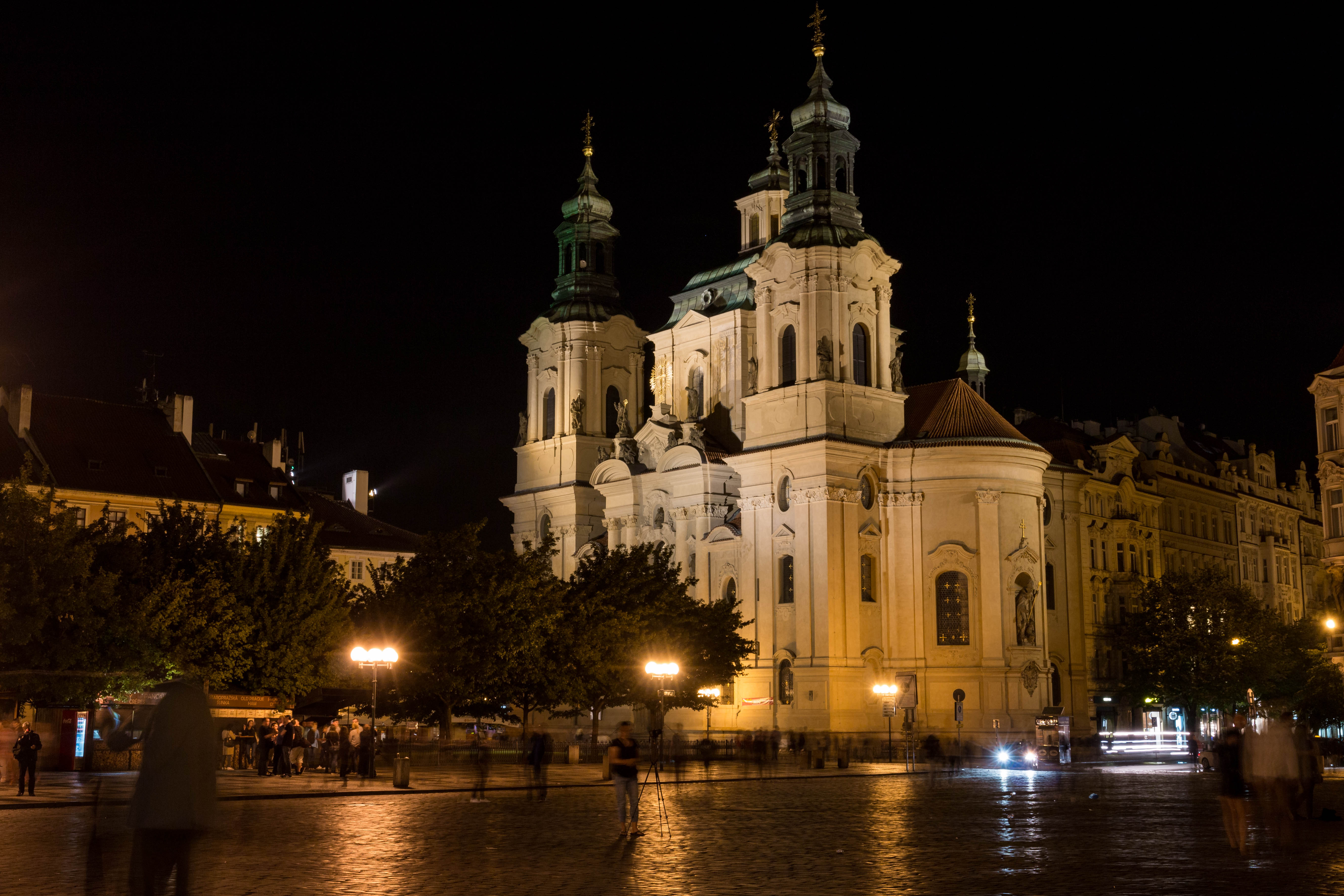 Nikolauskirche in Prag